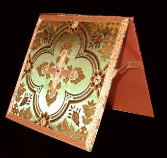 Een bursa, twee kartonnetjes, met textiel bespannen, waartussen het corporale wordt bewaard. Zelf gemaakt